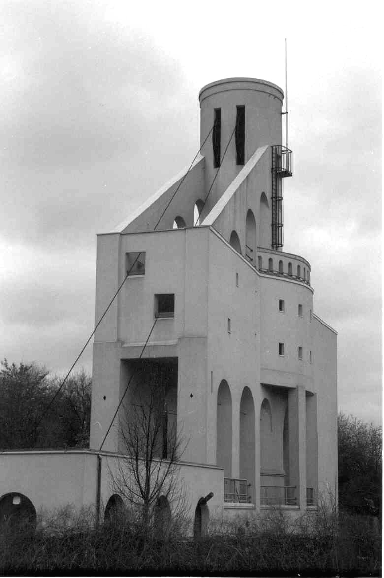 Schacht Nulland Kerkrade. Foto: R. van de Laar